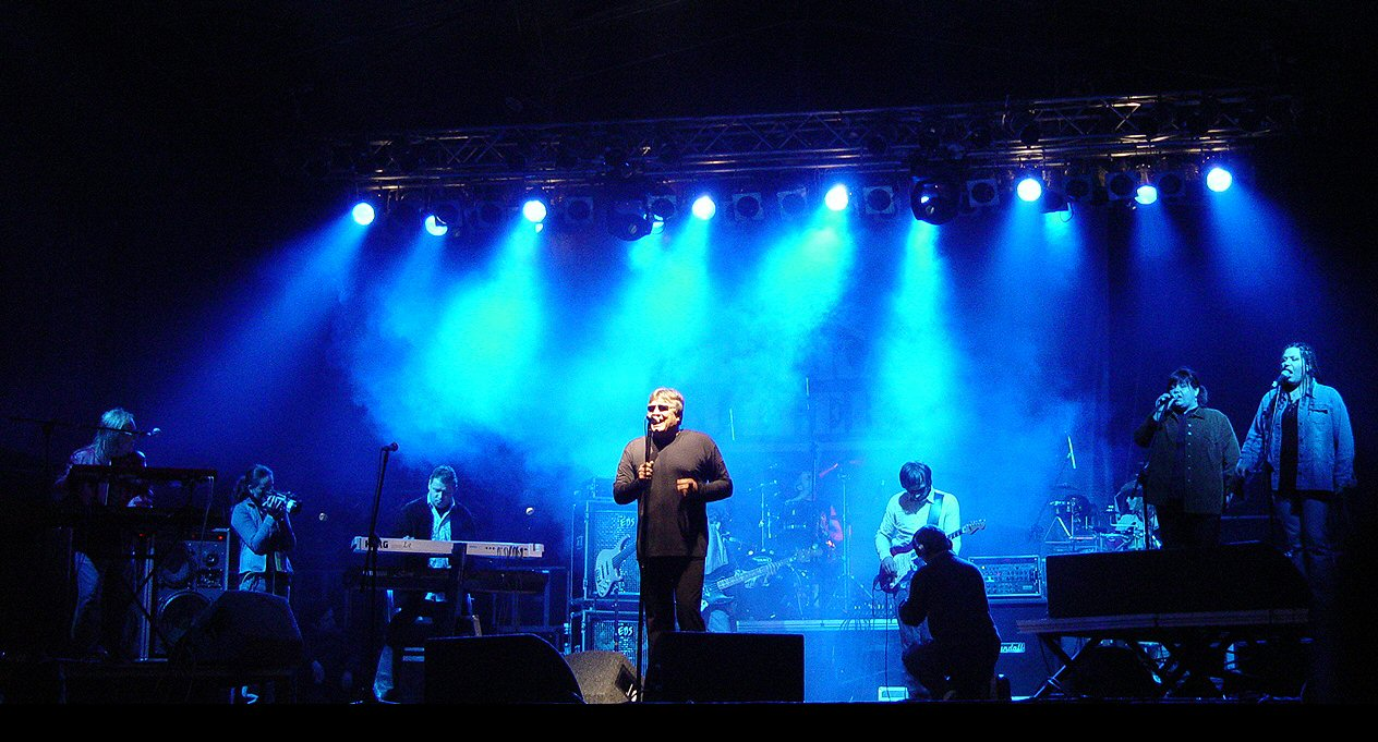 Budka Suflera - koncert w Gdańsku na placu Zebrań Ludowych, 14 sierpnia 2005.